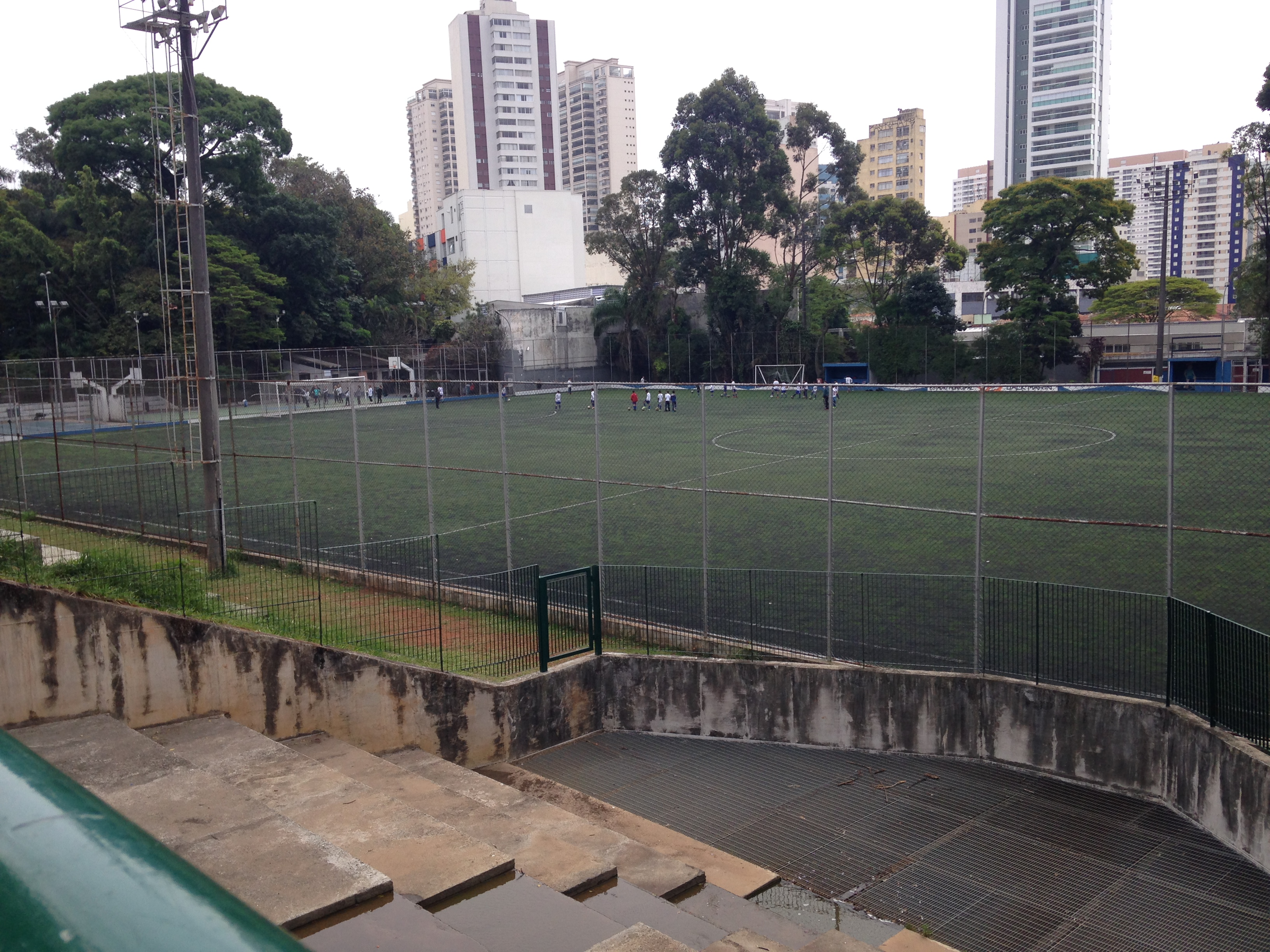 Campo de futebol com gramado no Parque da Aclimação